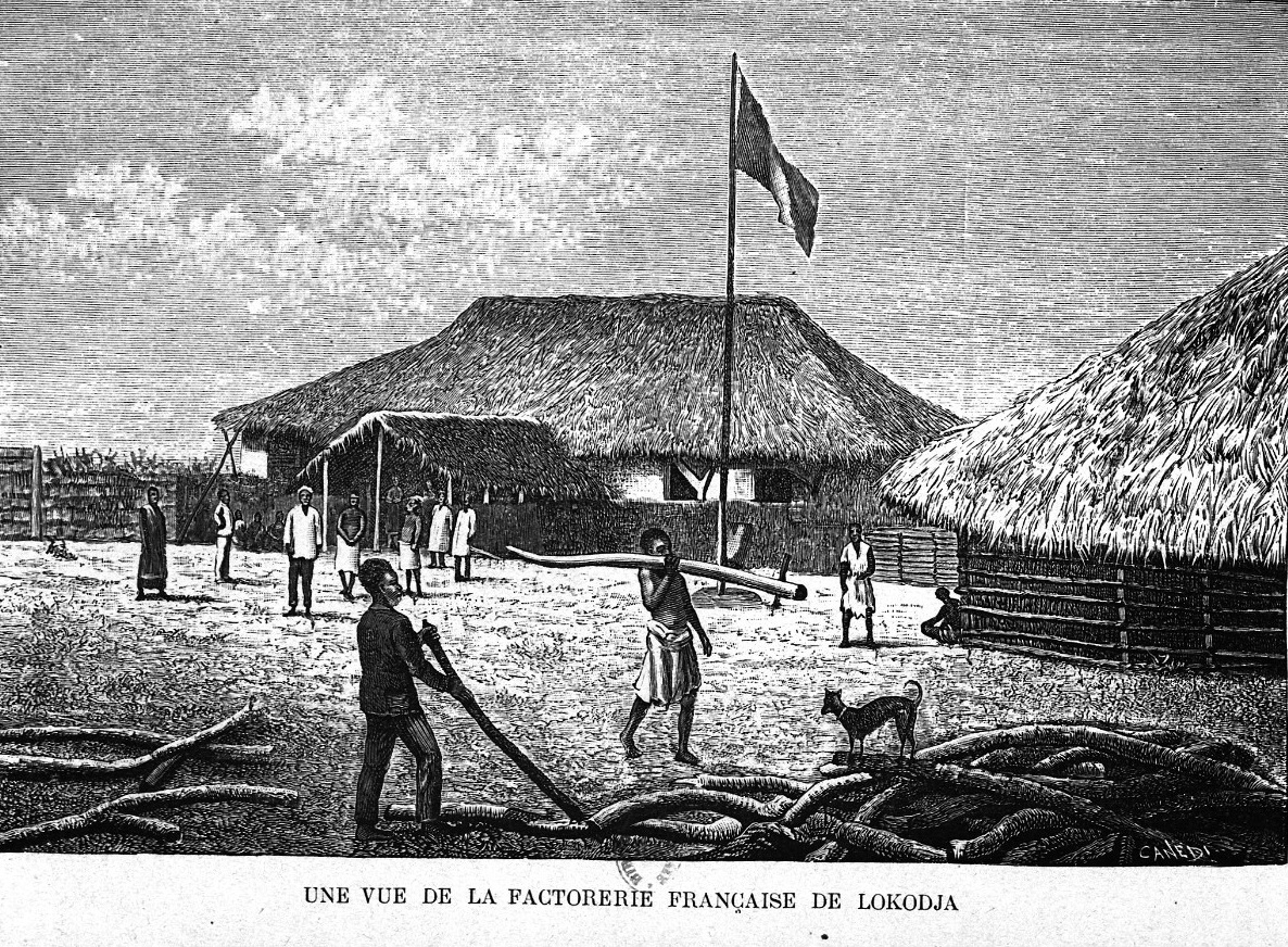 Gravure - La Factorerie Française à Lokodja Bas-Niger (provenant de photographies prises sur les lieux par l'auteur)